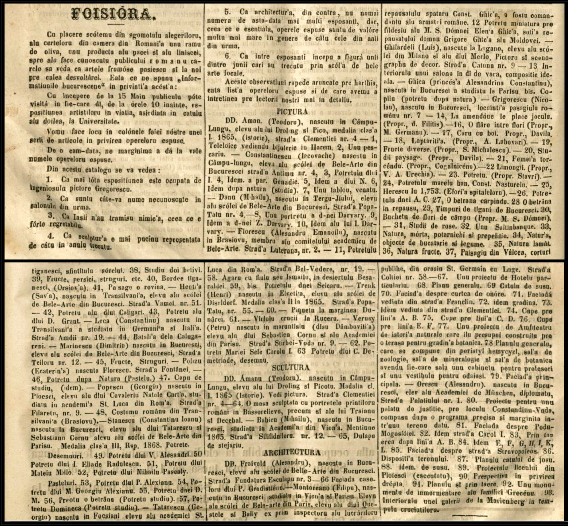 Expoziția artiștilor în viață din anul 1870 - Foișiora.